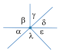 ángulos , teselación